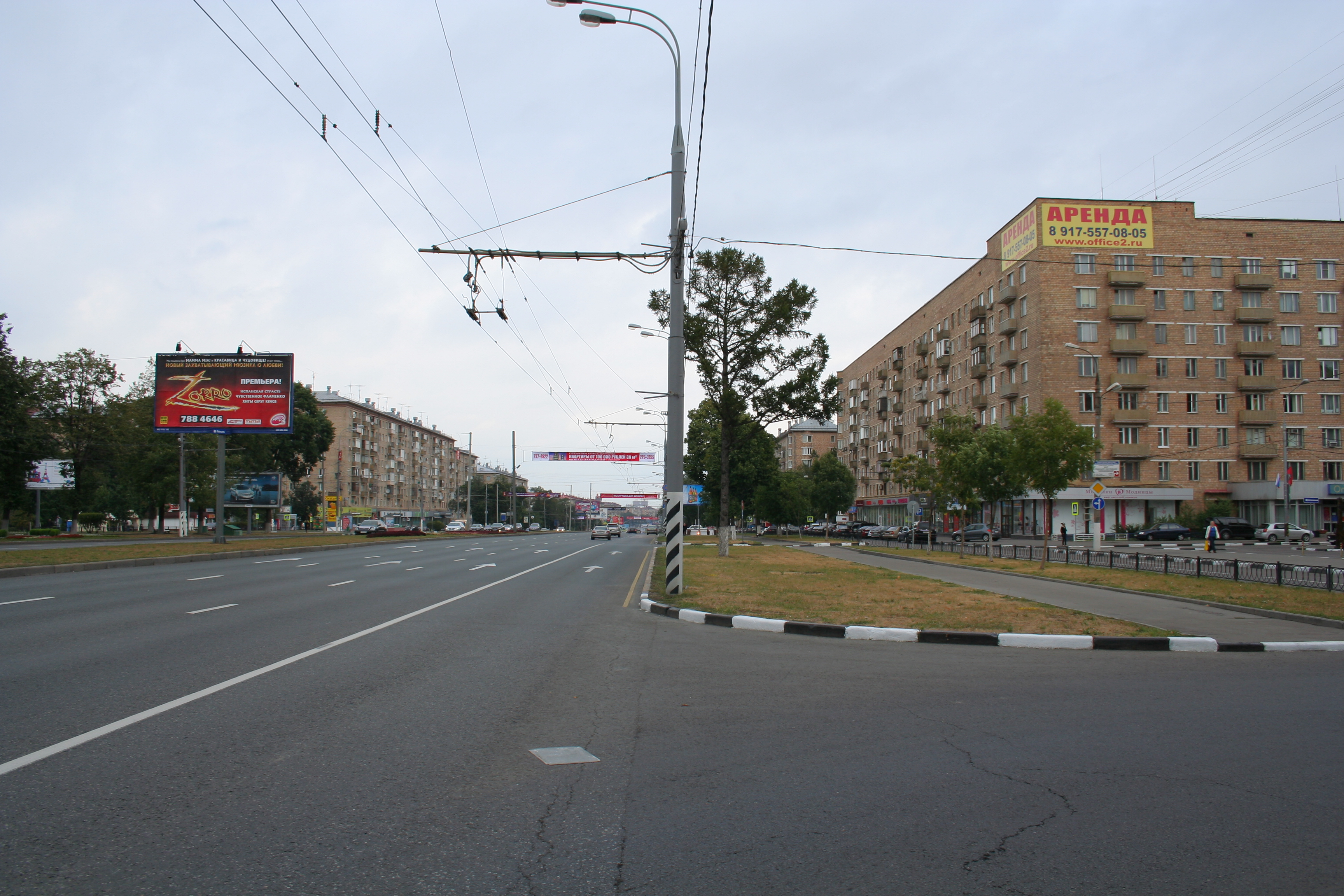 Ленинский проспект в Москве. Угол улицы Гарибальди. Вид в сторону центра.